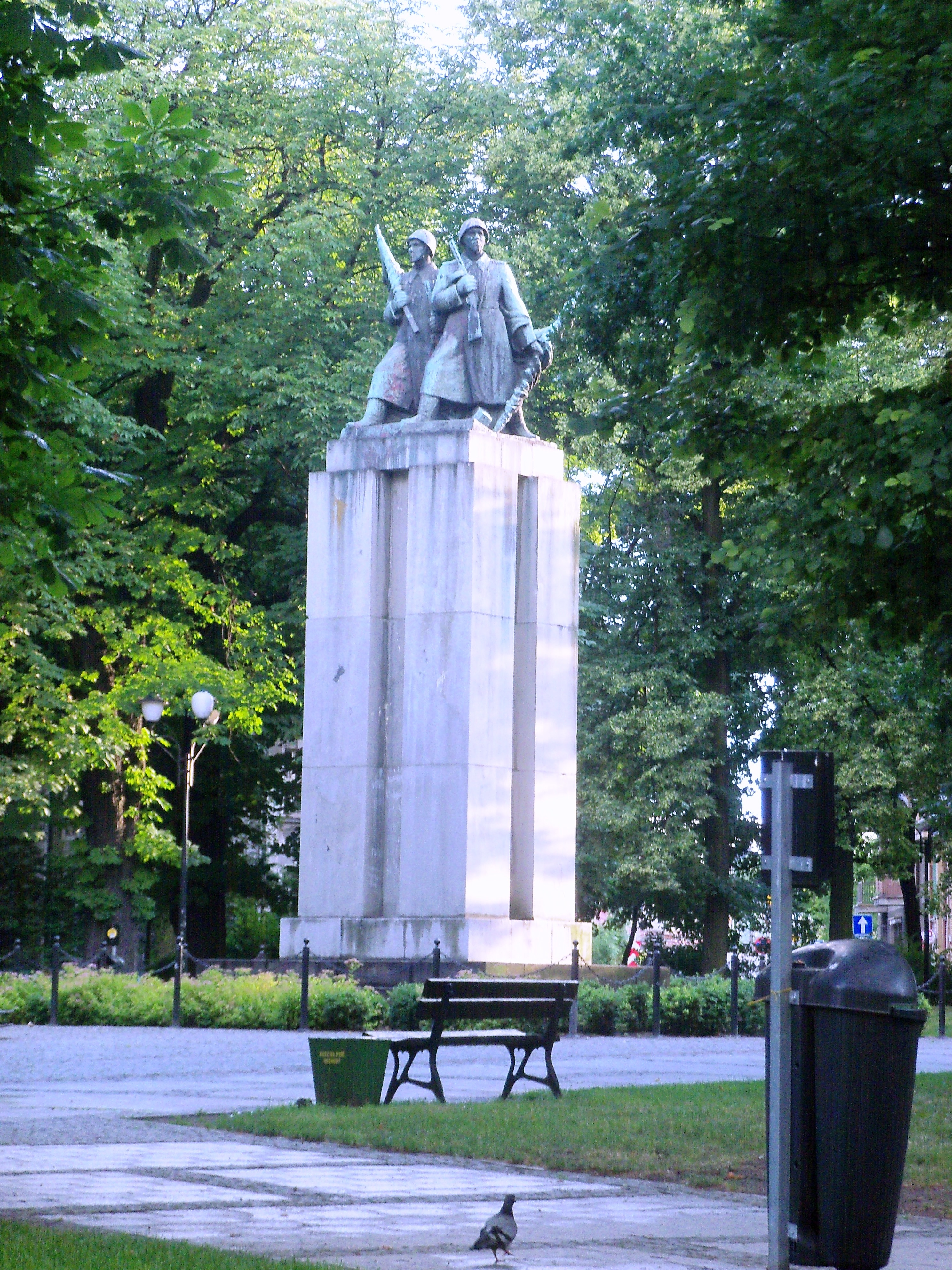 Pomnik na placu Wolności w Katowicach